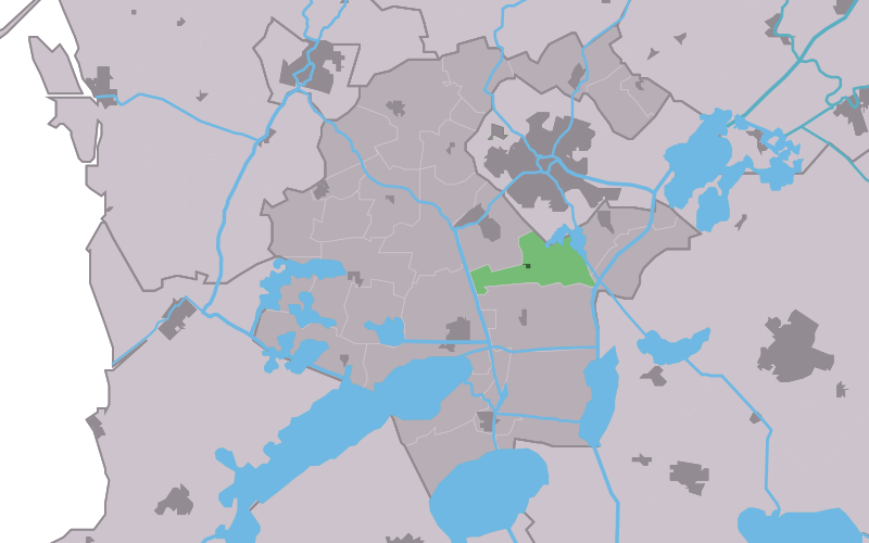 Kaartsje fan himrik fan Jutryp